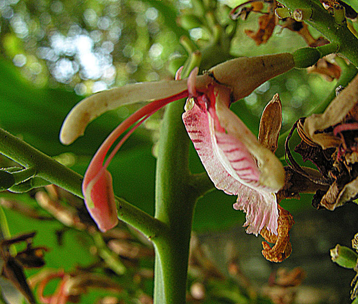 Alpinia galanga